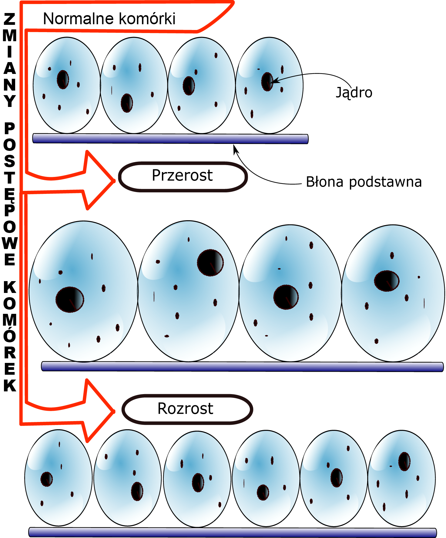 Prosta ilustracja różnic pomiędzy rozrostem a przerostem.